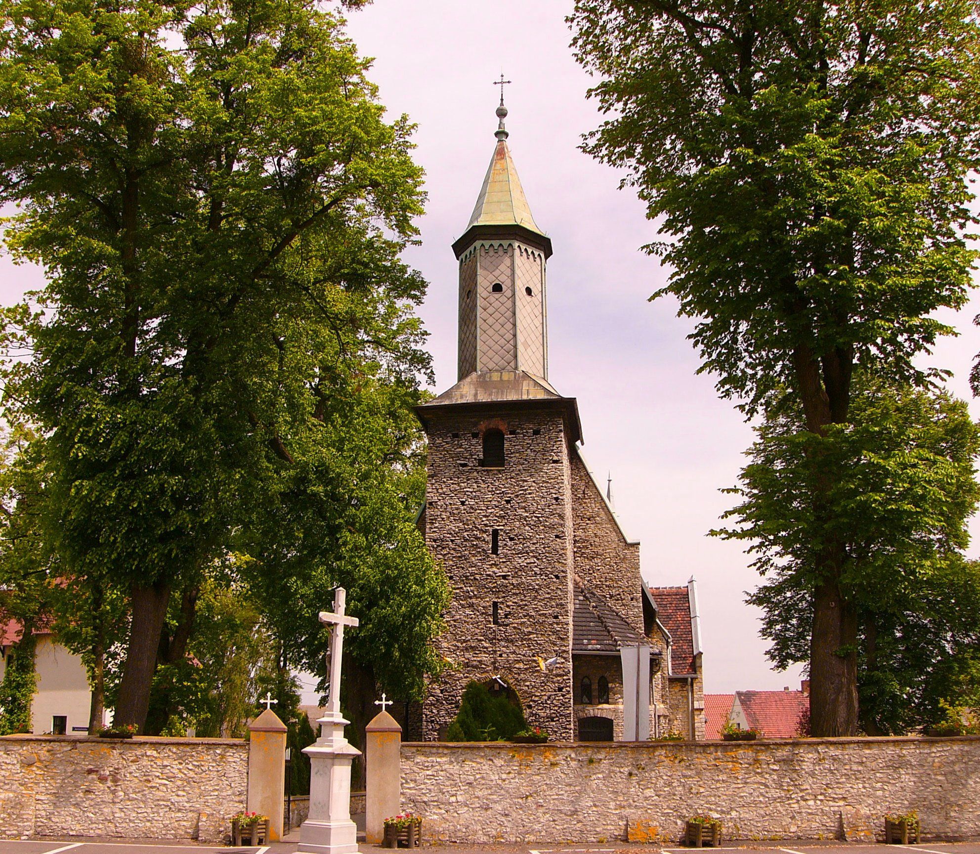 Centawa - kościół parafialny p.w. NMP, XV/XVI, XIX